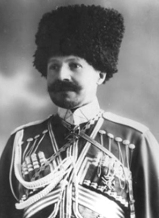 Трубецкой, Георгий Иванович